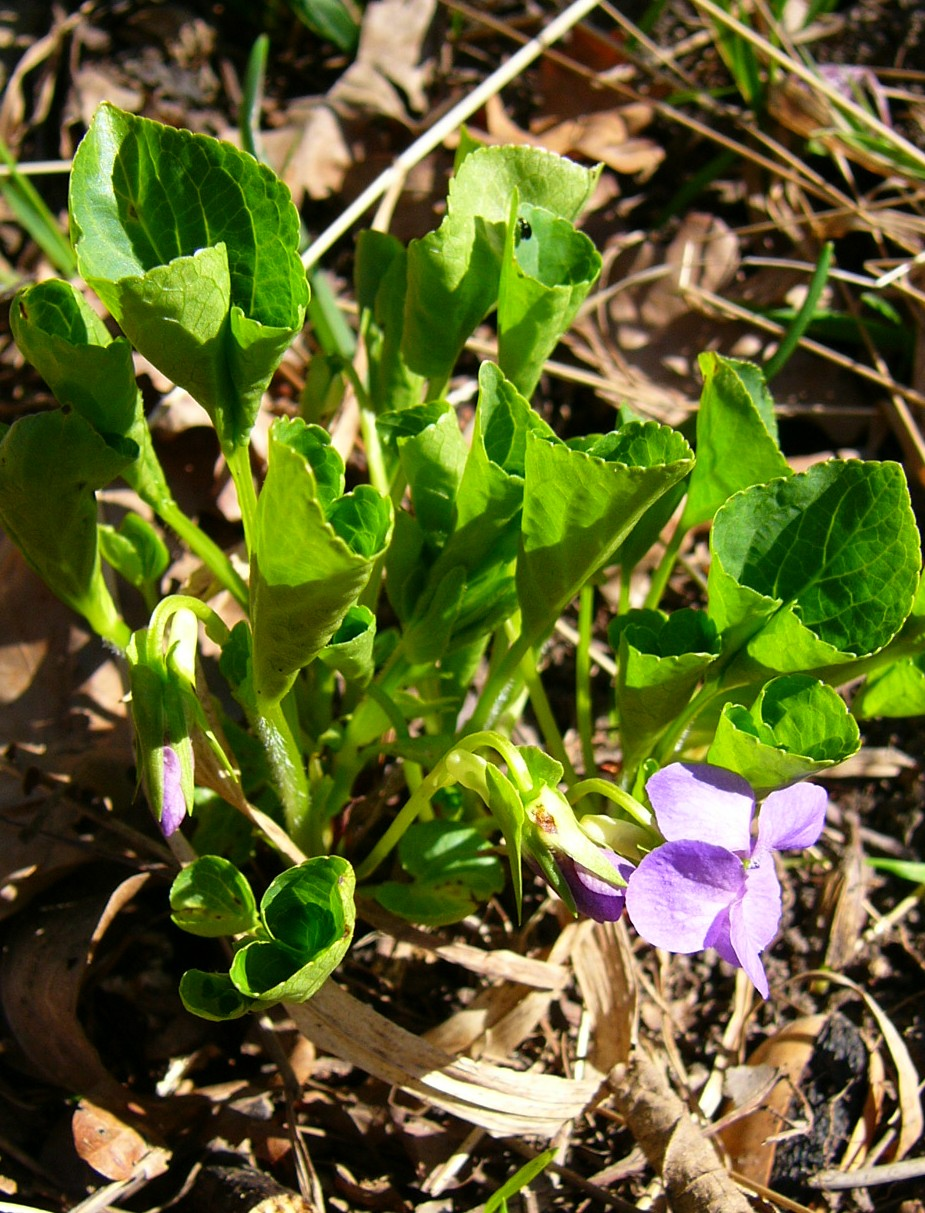 Wunderveilchen Habitus